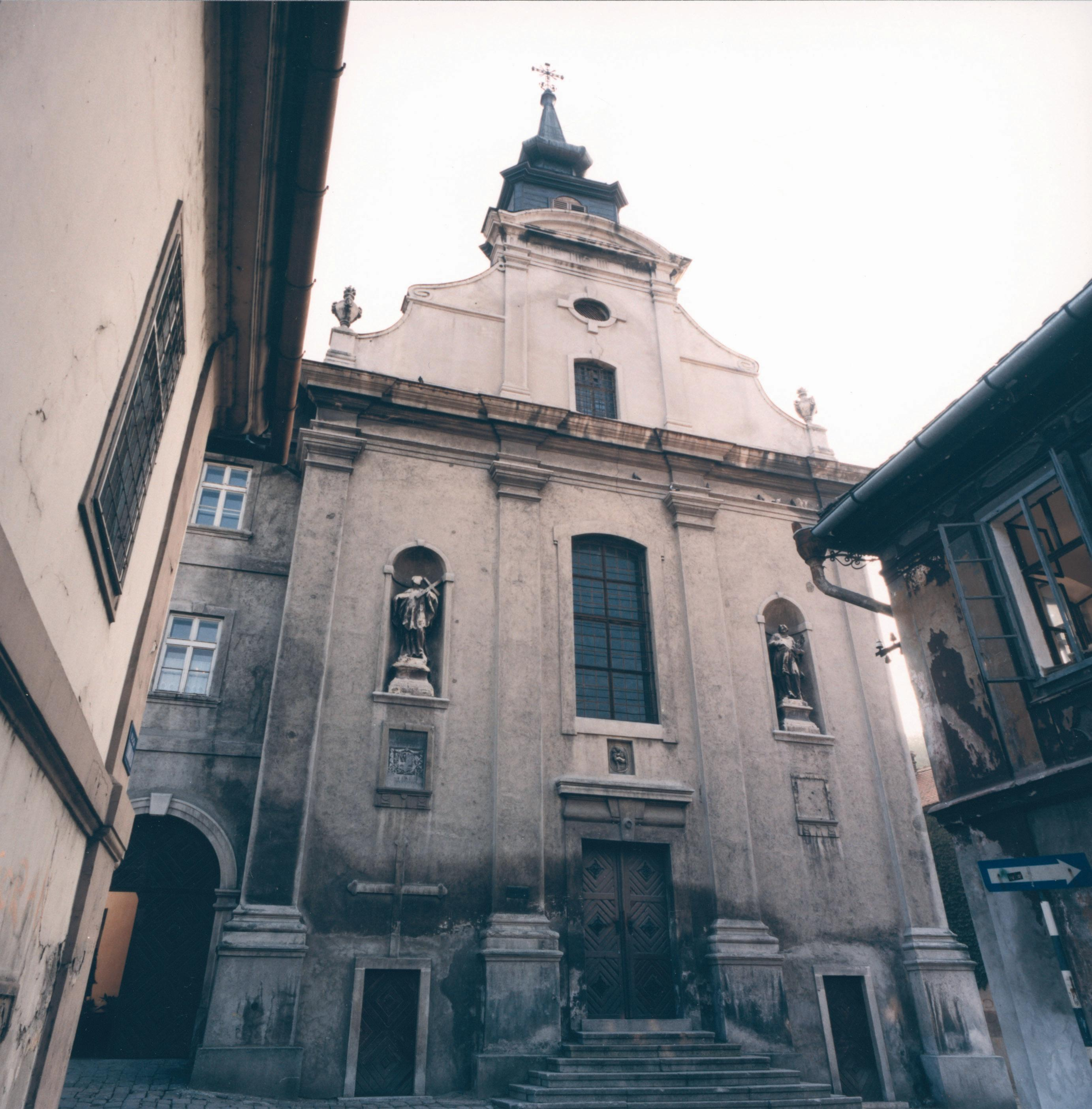 Pročelje crkve sv. Jurja u Petrovaradinu